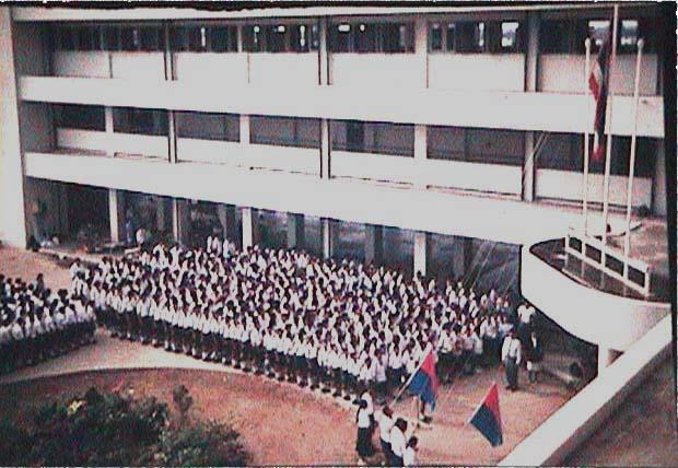 เข้าแถวเคารพธงชาติ ธงโรงเรียน ในช่วงเริ่มเข้าใช้อาคารครั้งแรก